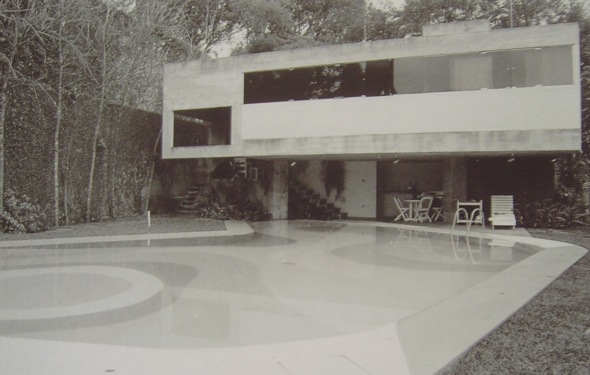 Casa Elza Berquó, 1967 - projeto por João Batista Vilanova Artigas